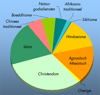 Religions world wide. Dutch captions. Distibrutie van religie naar aantallen aanhangers wereldwijd.